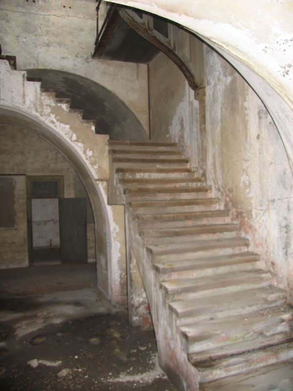 Prøvestensfortet (Prøvestenen), trappen til fortdækket